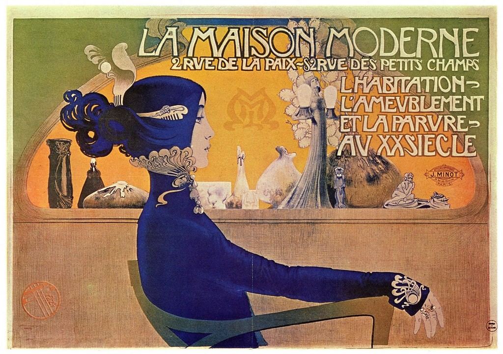 An advertisement for the Art Nouveau gallery "La Maison Moderne"